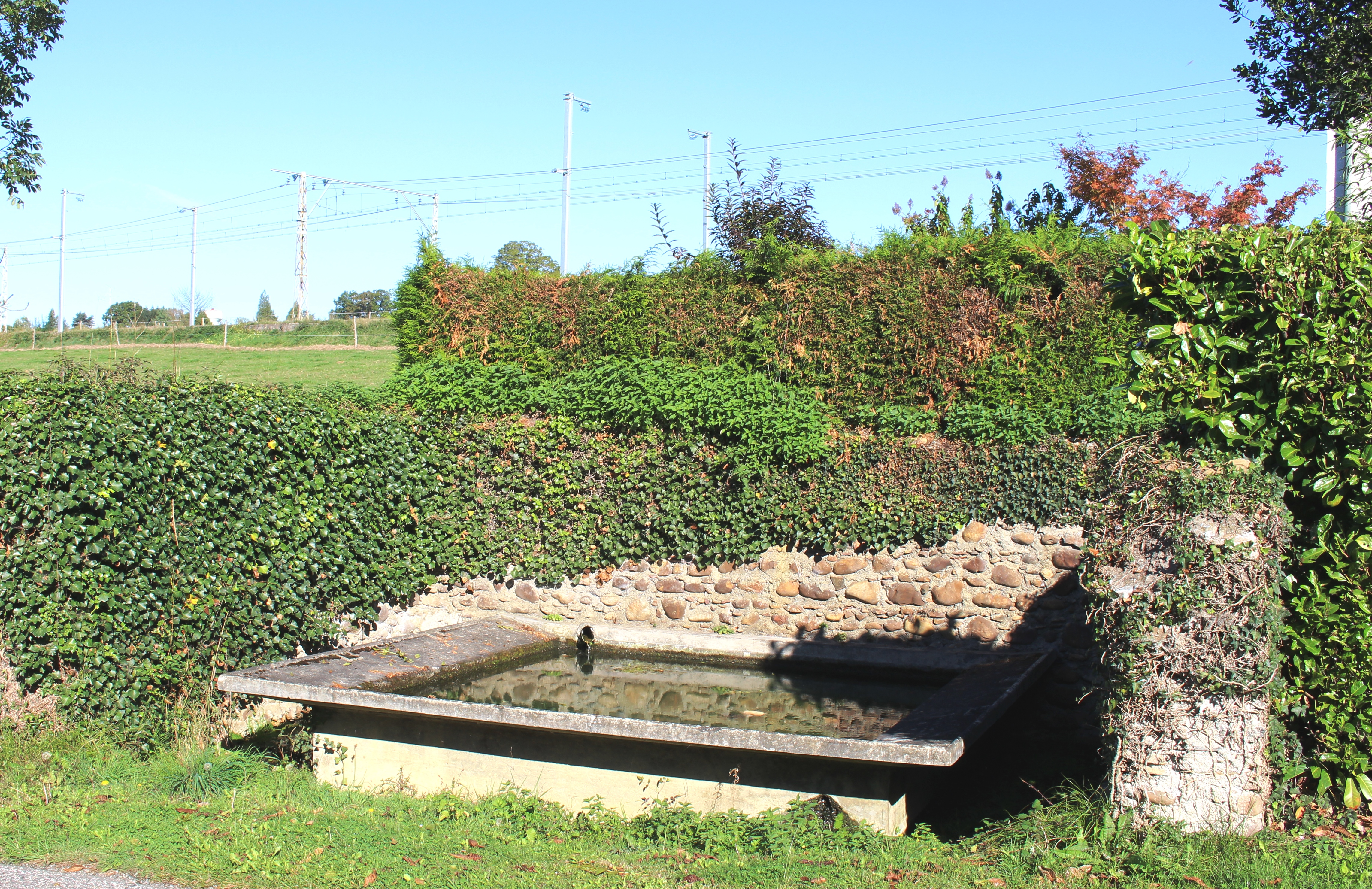 Lavoir de Cantaous (Hautes-Pyrénées)